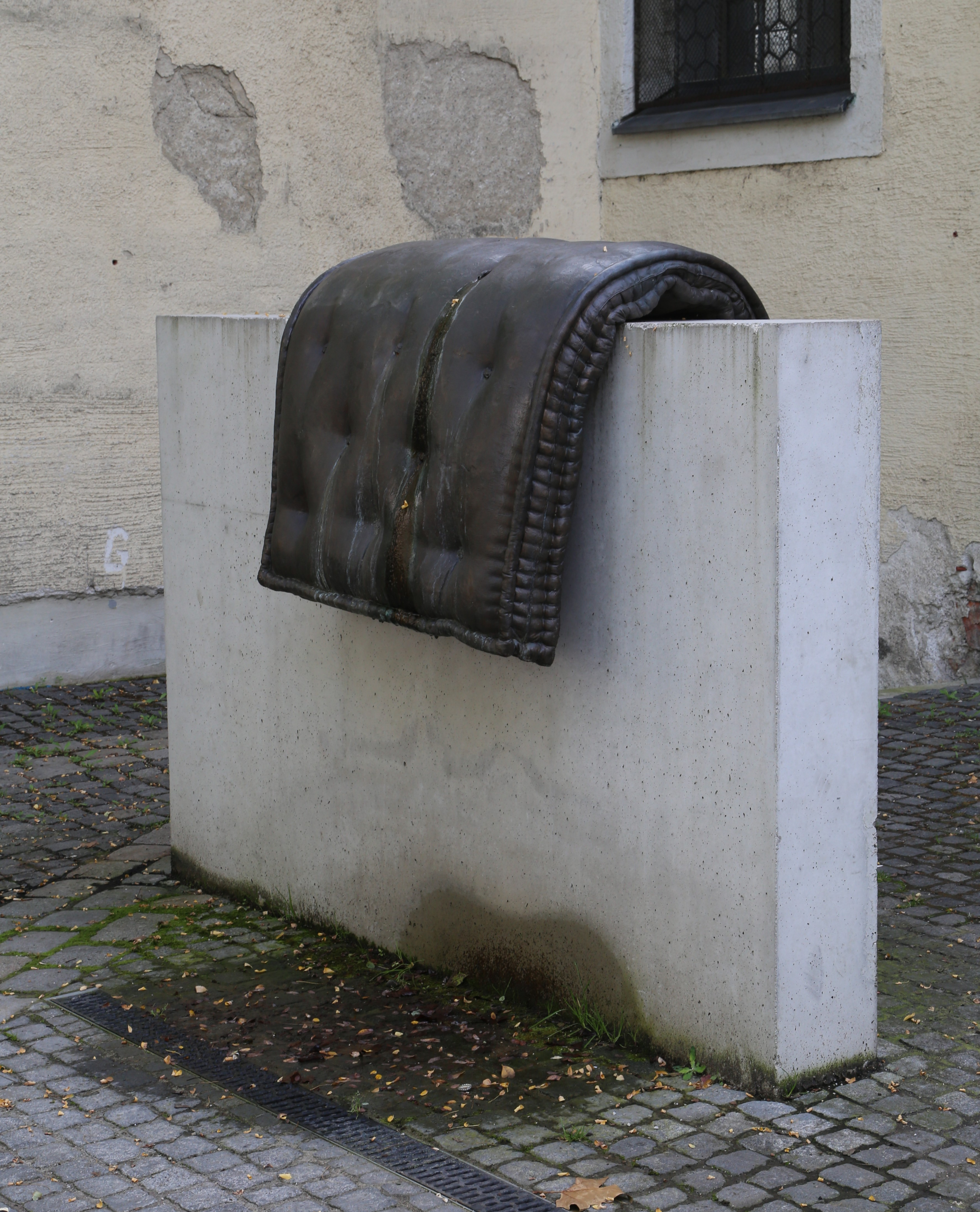 Tatiana Trouvé: Waterfall; eine aus Bronze nachgebildete Matratze ist über eine schmale weiße Betonmauer geworfen. Aus den Knöpfen der Matratze tropft Wasser und ergießt sich über den Platz. Stephansplatz, München